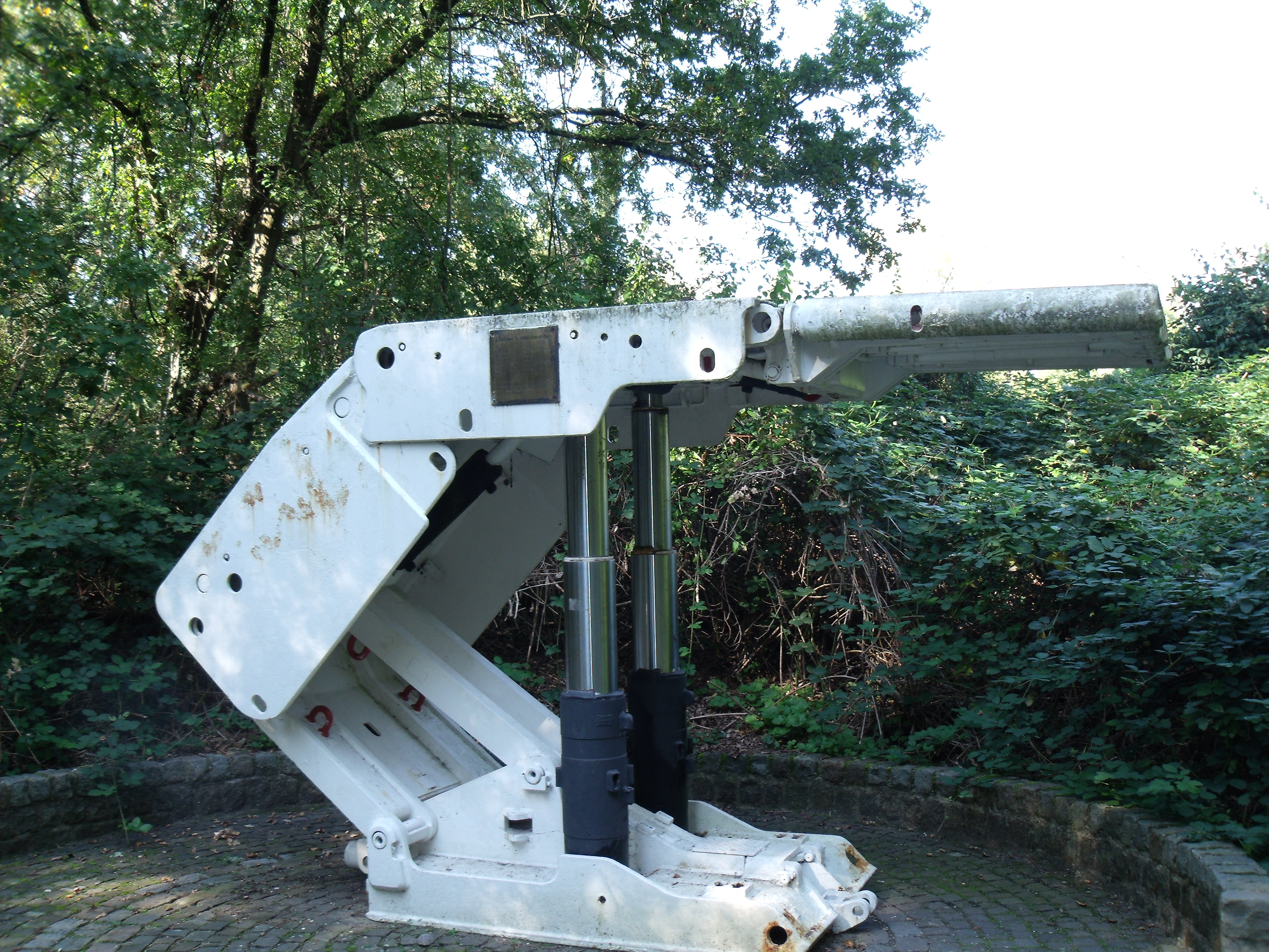 Schildausbau mit zwei Hydraulikstempeln